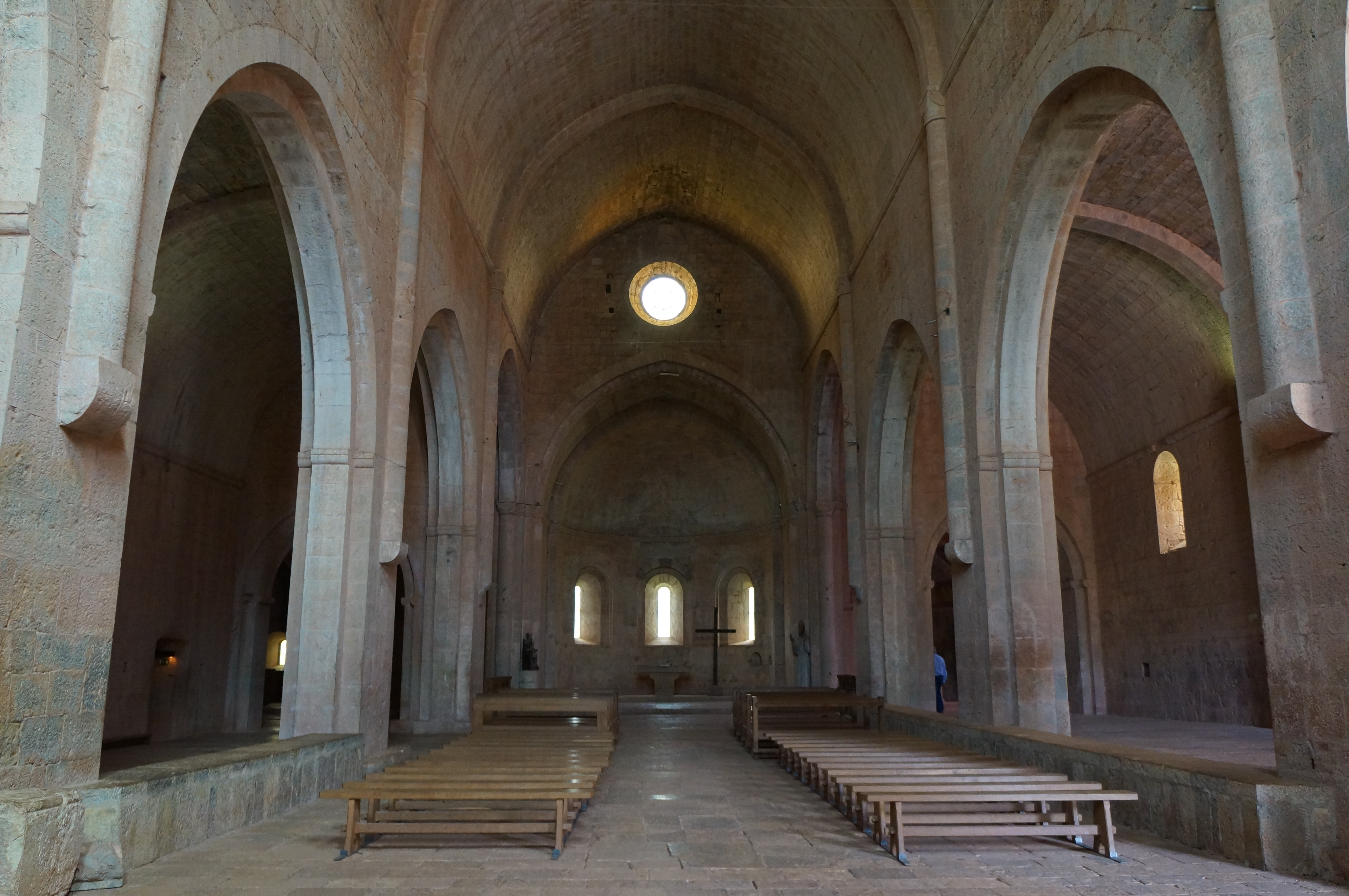 Kloster von Thoronet